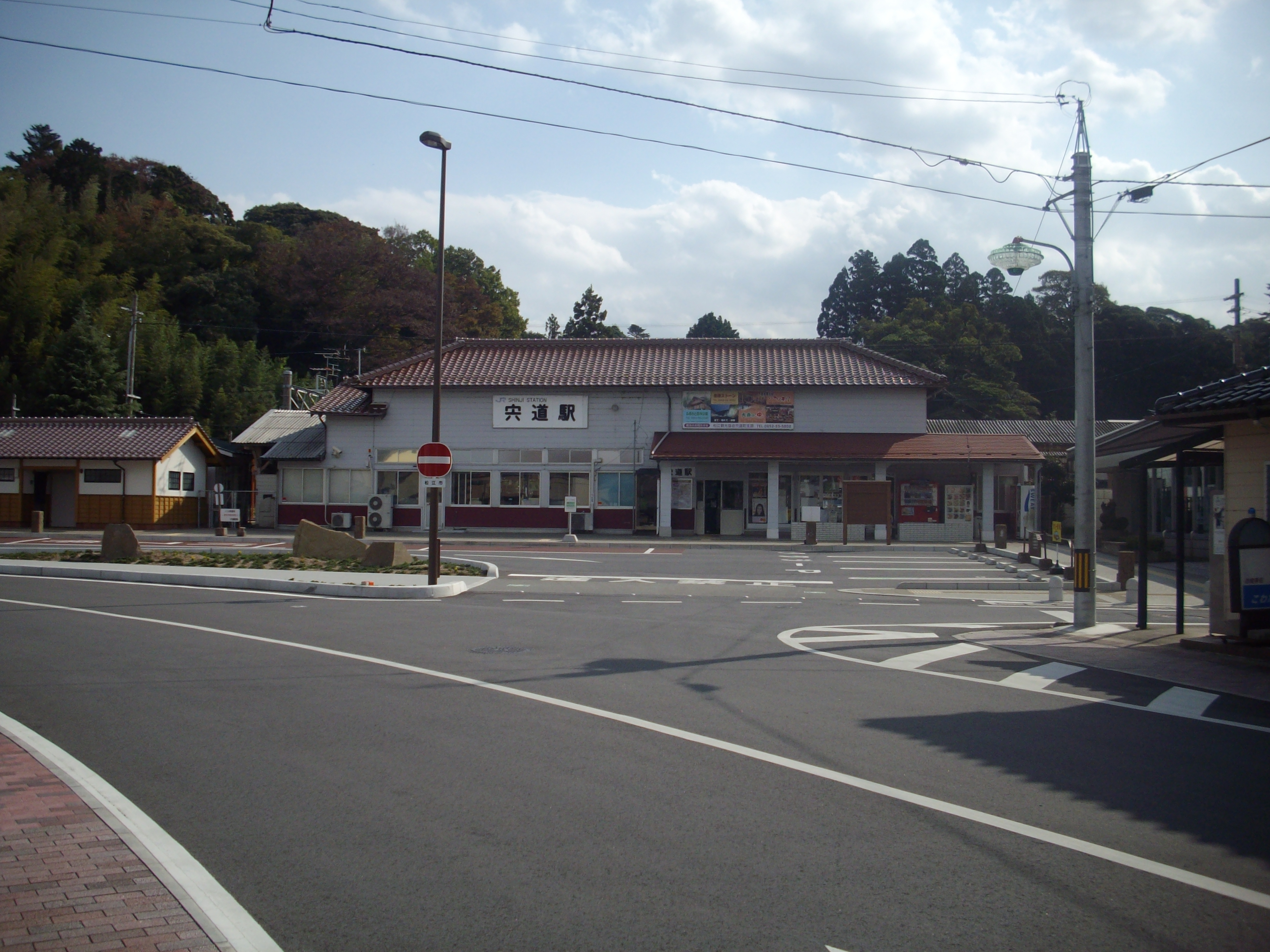 JR山陰線宍道駅